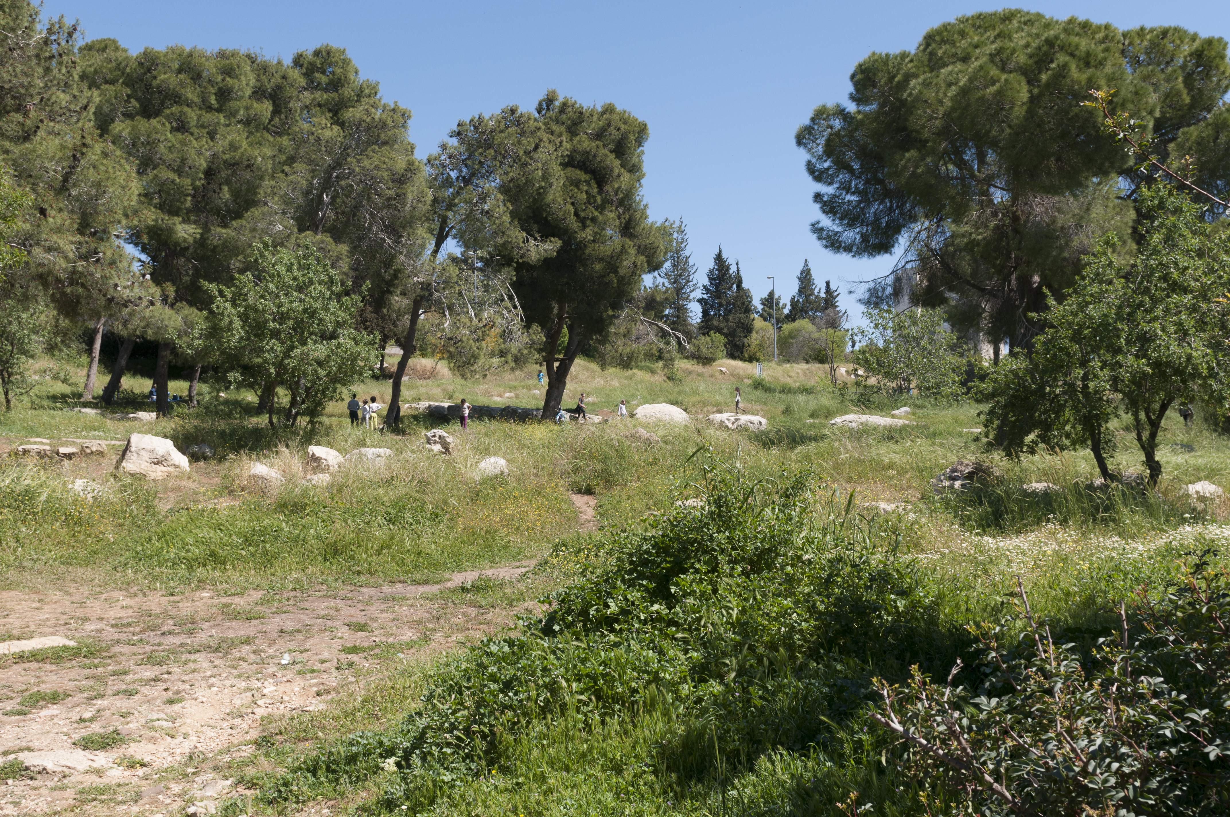 Motti Garden Jerusalem